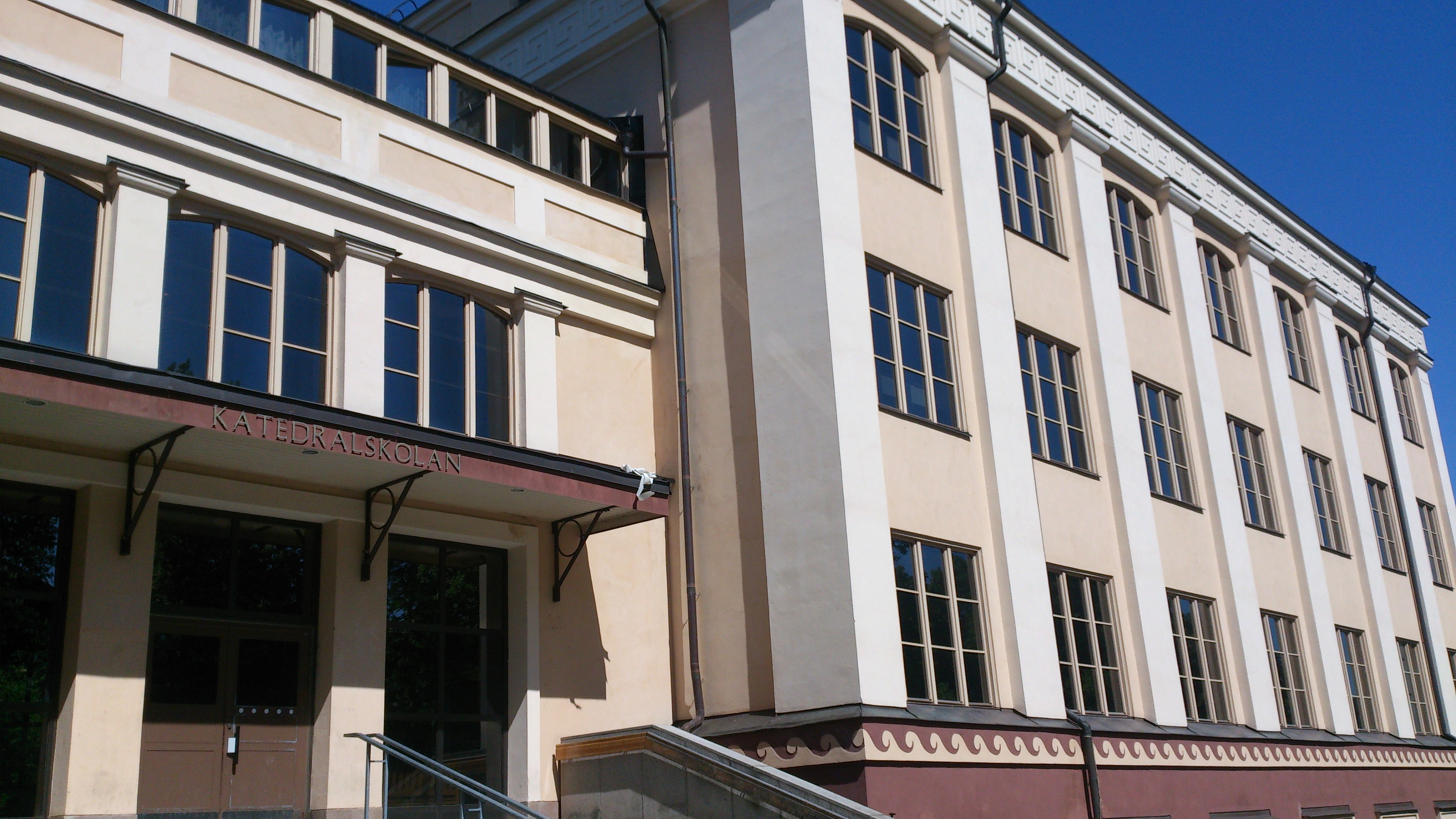 Katedralskolans institutionsbyggnad 2 juni 2014